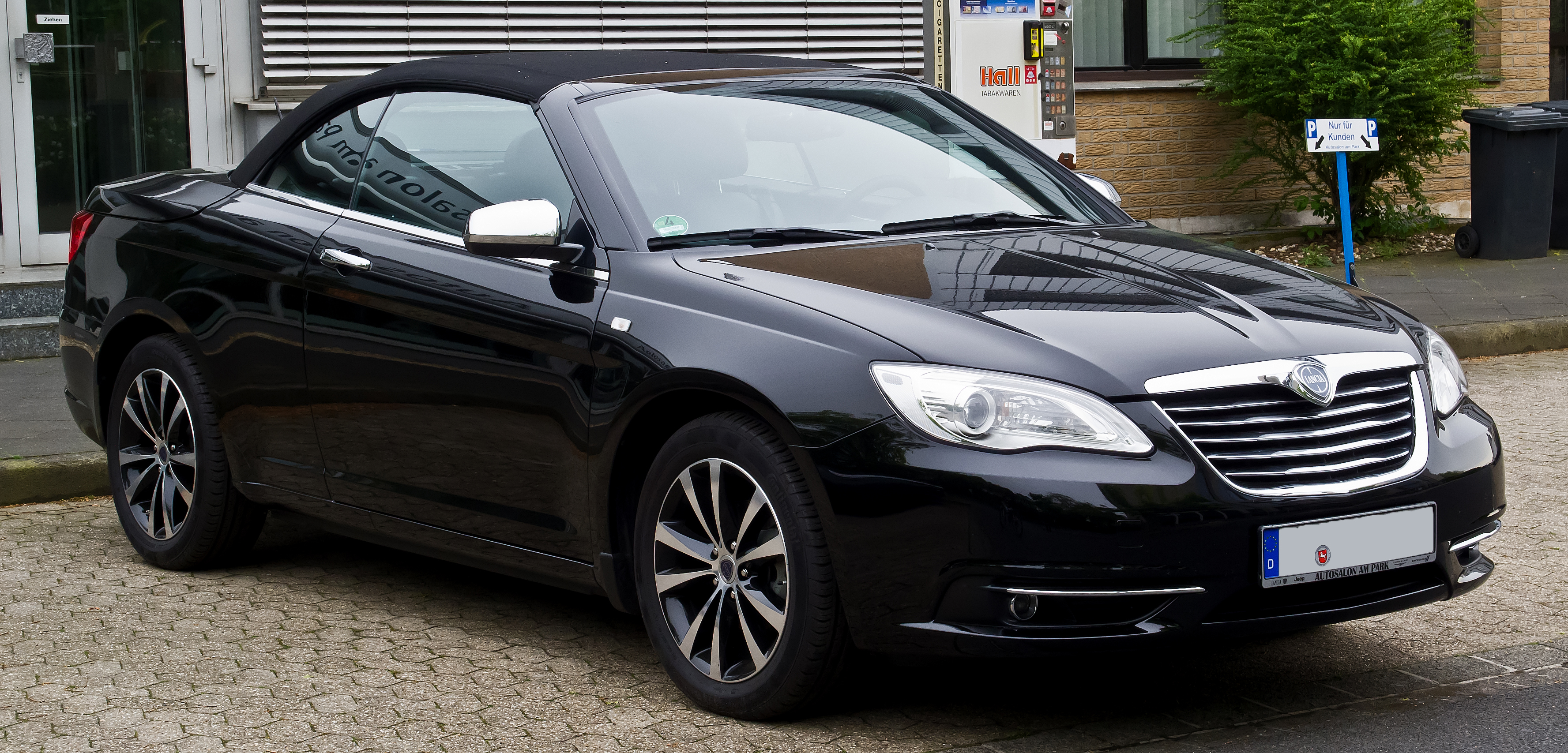 Lancia Flavia 2.4 16v